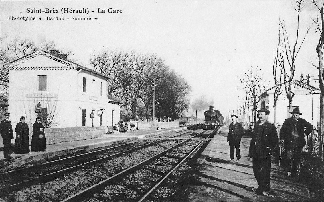 La gare PLM avec son bâtiment voyageurs et son abris du quai opposé. Un train vapeur arrive en gare.